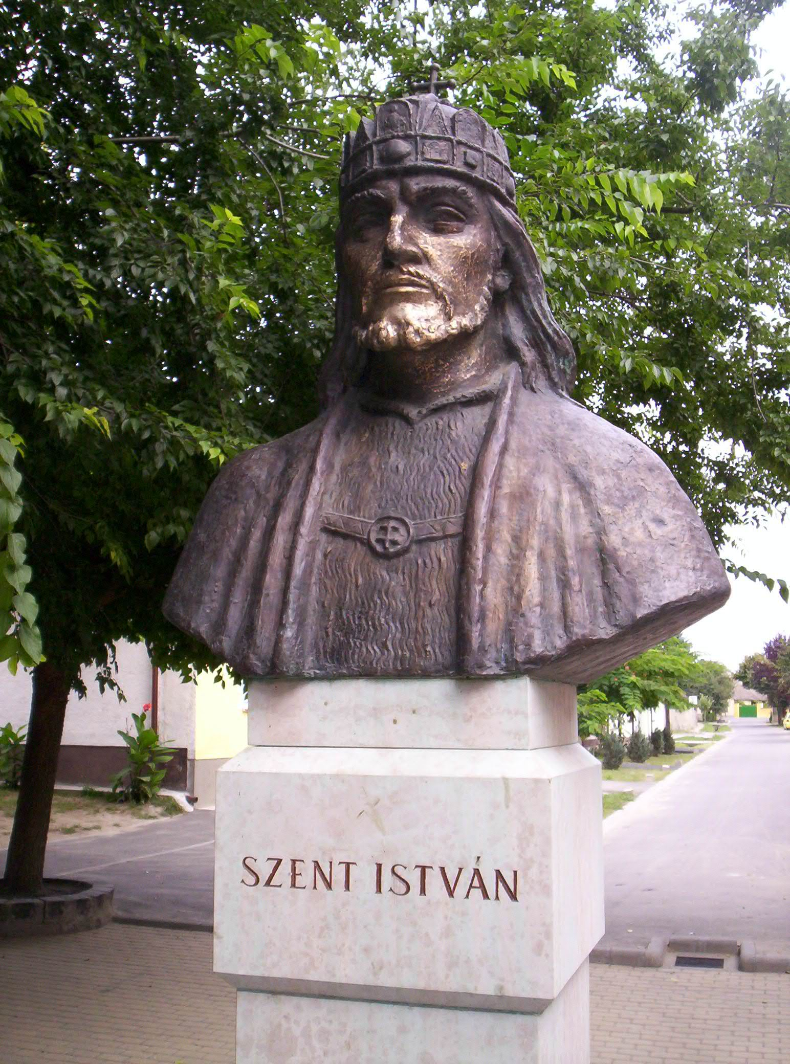 Szent István szobra Baján. Búza Barna (2001) alkotása – photo taken by uploader User:Csanády in 2006.